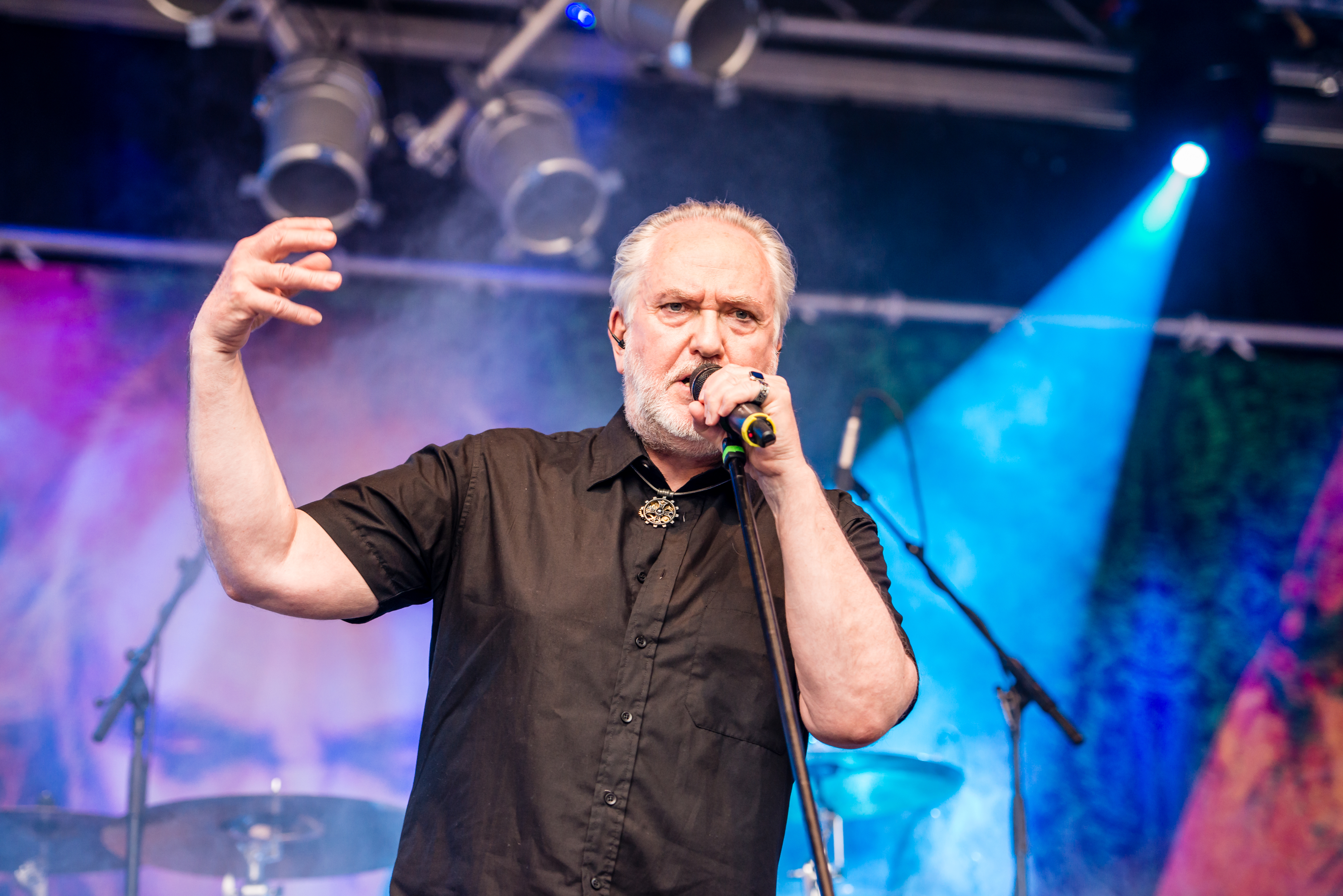 'Castle Rock 2015; Mülheim Schloß Broich': 'Joachim Witt'